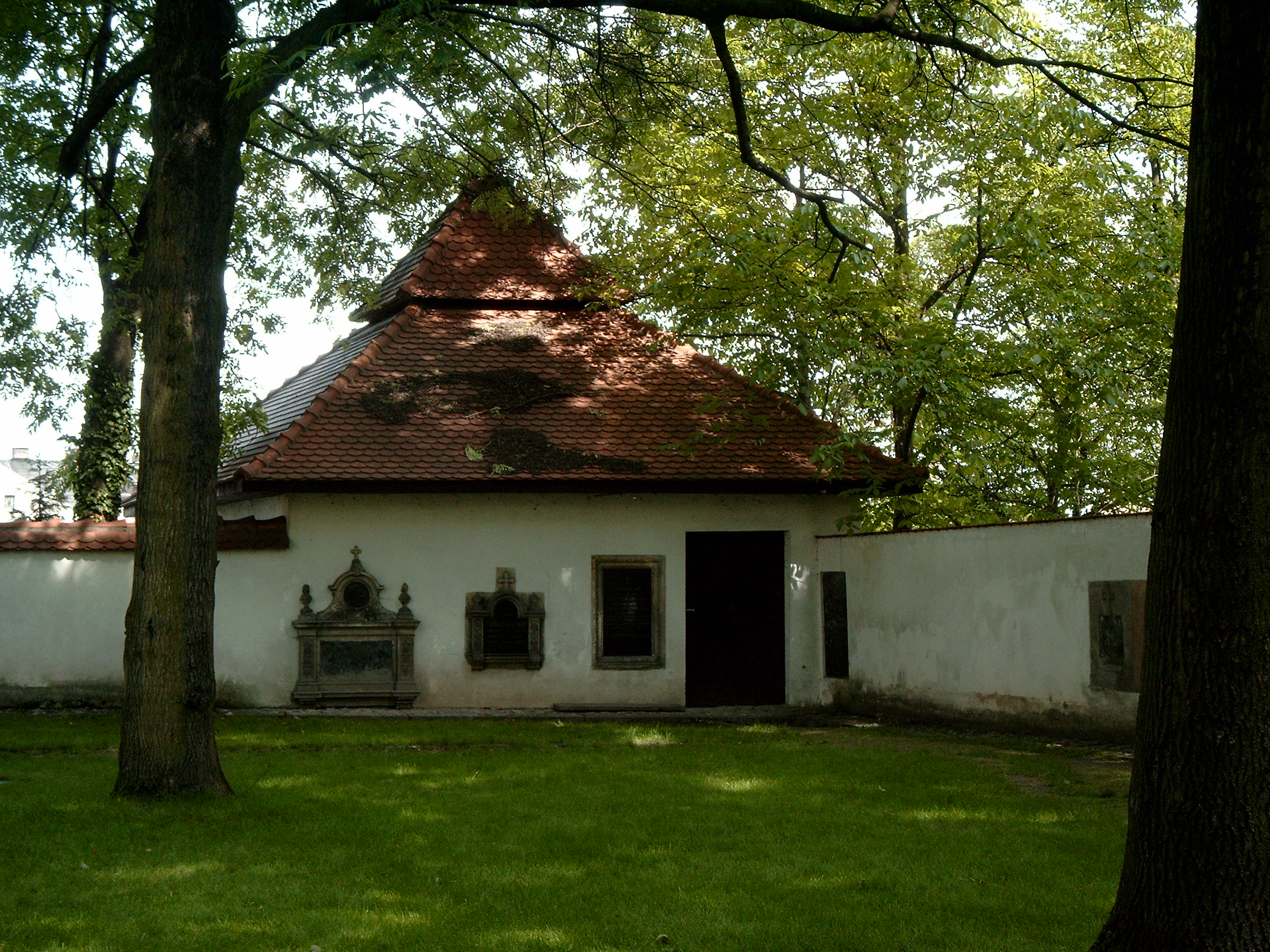 Grobowiec sióstr Norbertanek z I połowy XIX wieku, znajdujący się przy kościele Najświętszego Salwatora w Krakowie